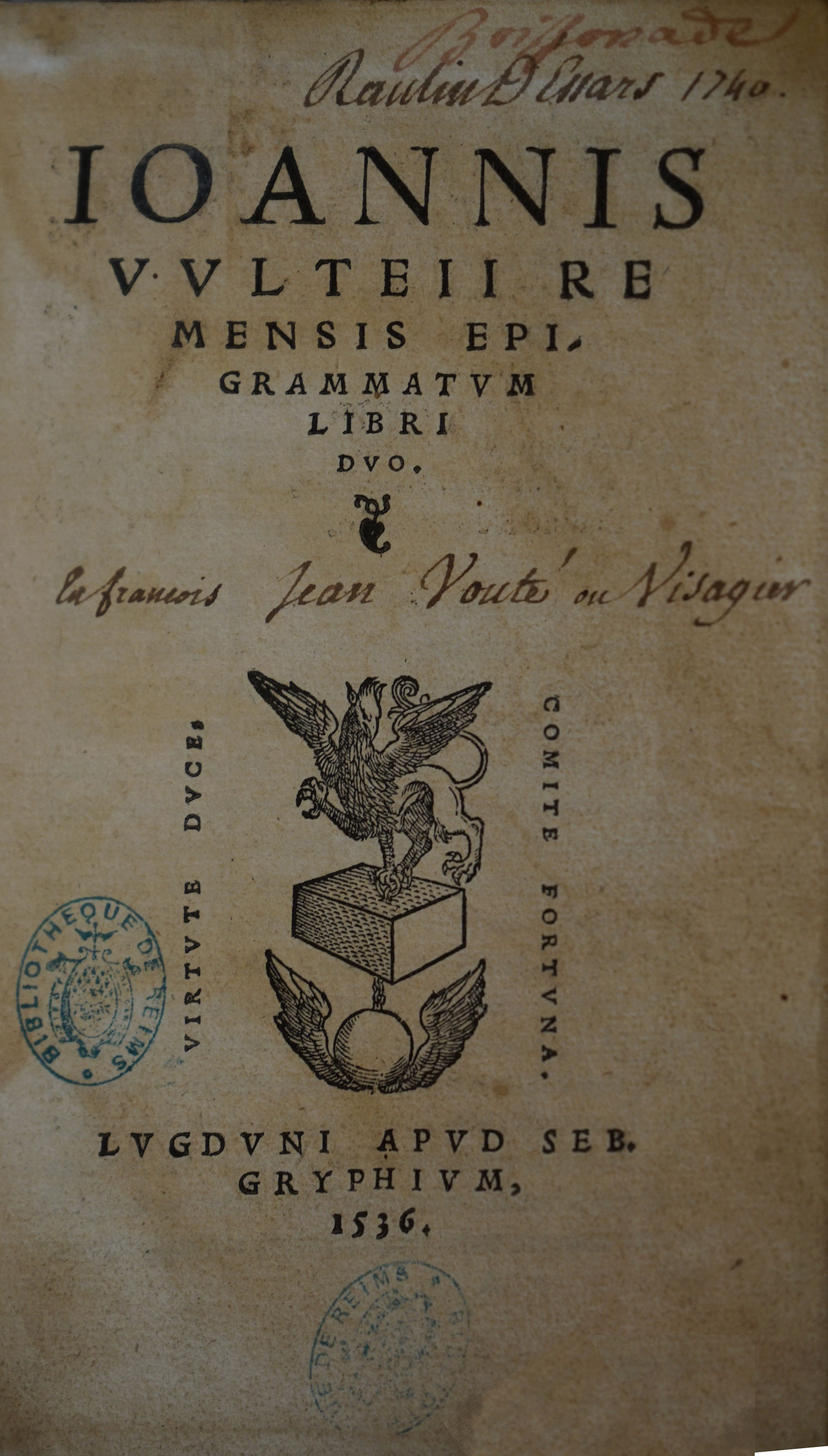 écrit par J Visagier